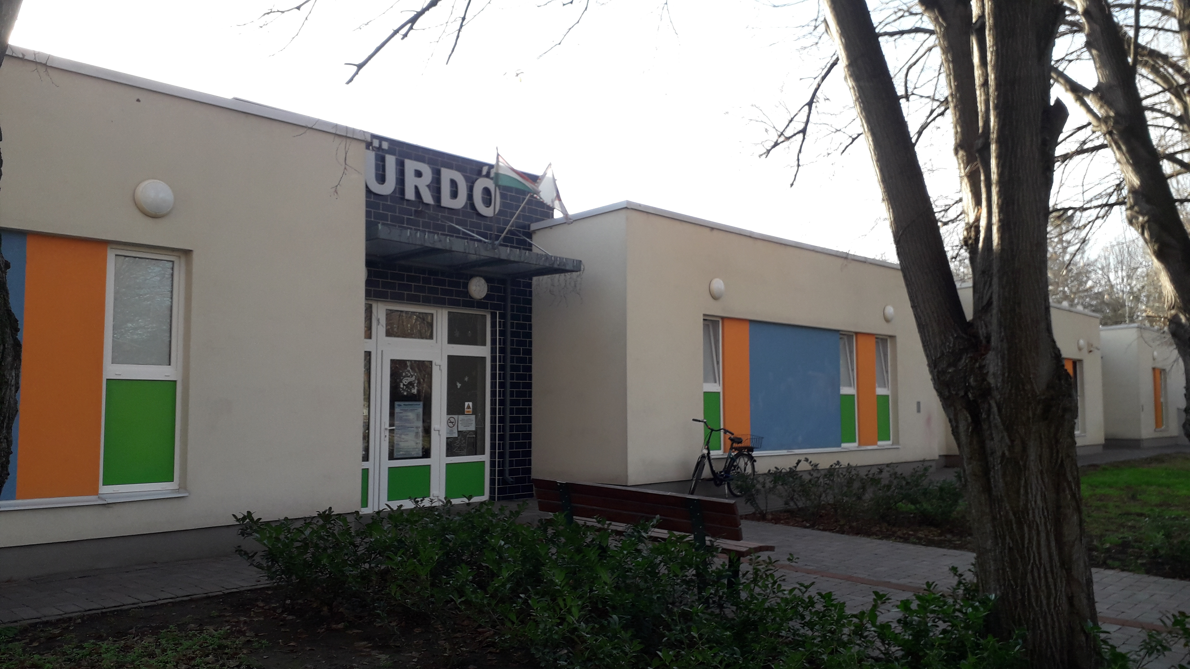 Nagyszénási Parkfürdő bejárata